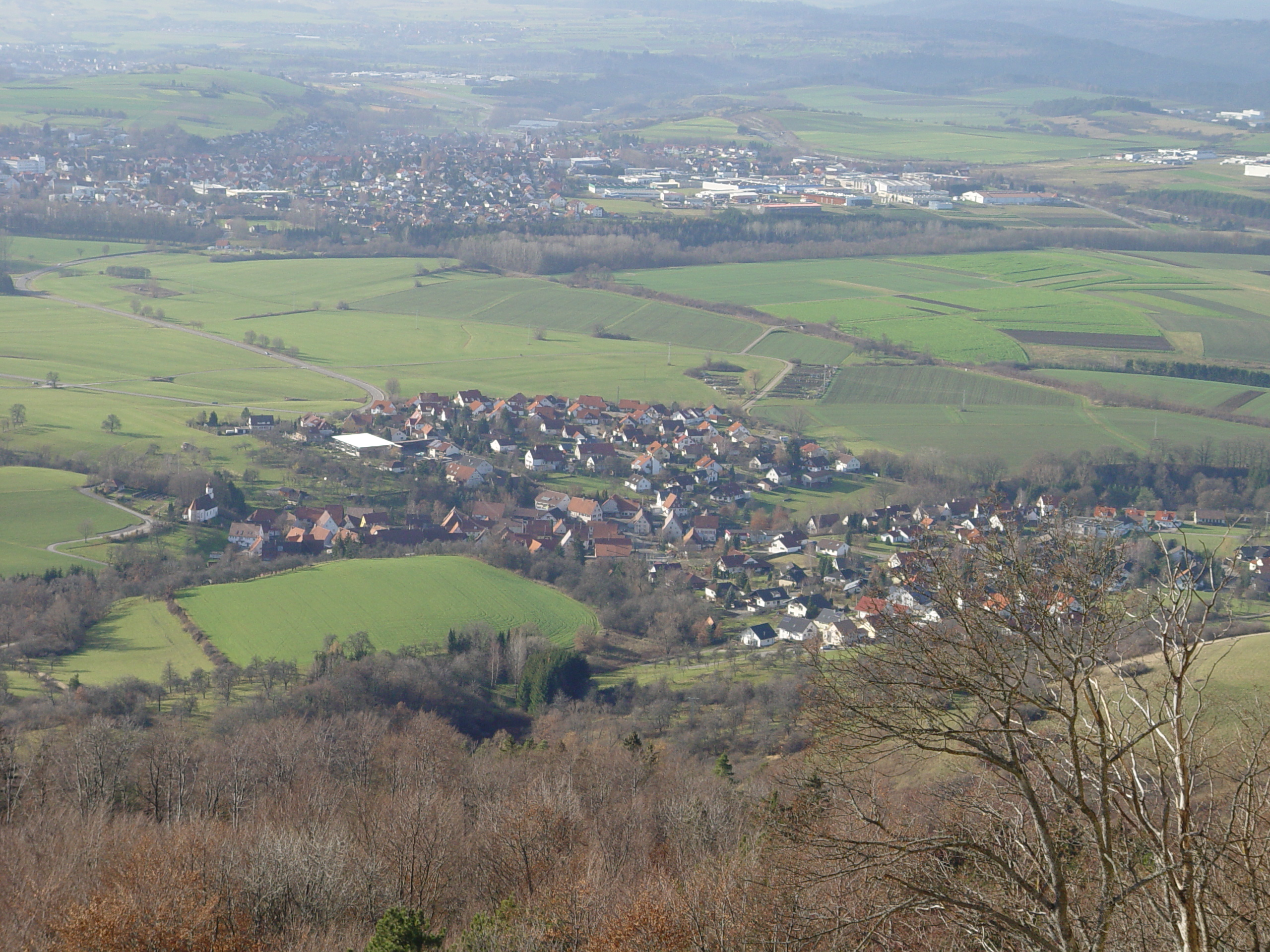 im Vordergrund Zimmern, hinten Bisingen, gesehen von der Burg Hohenzollern. Bild gemacht am 02.12.2006 own work - Bild selbst gemacht Photographed by: Zollernalb